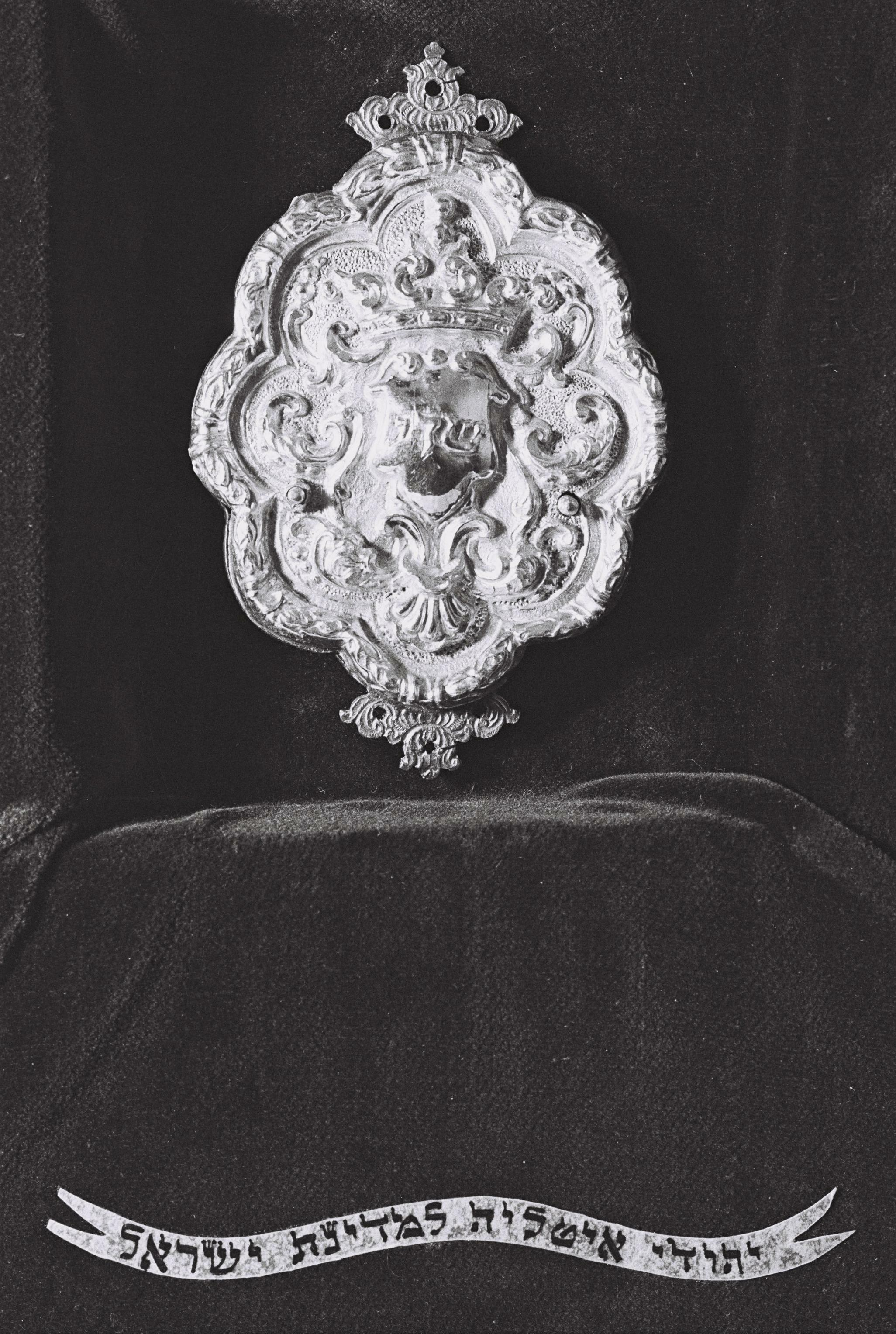 לוח זהב מתנת הקהילה היהודית ברומא למדינת ישראל עם הקמתה עברו 50 שנה